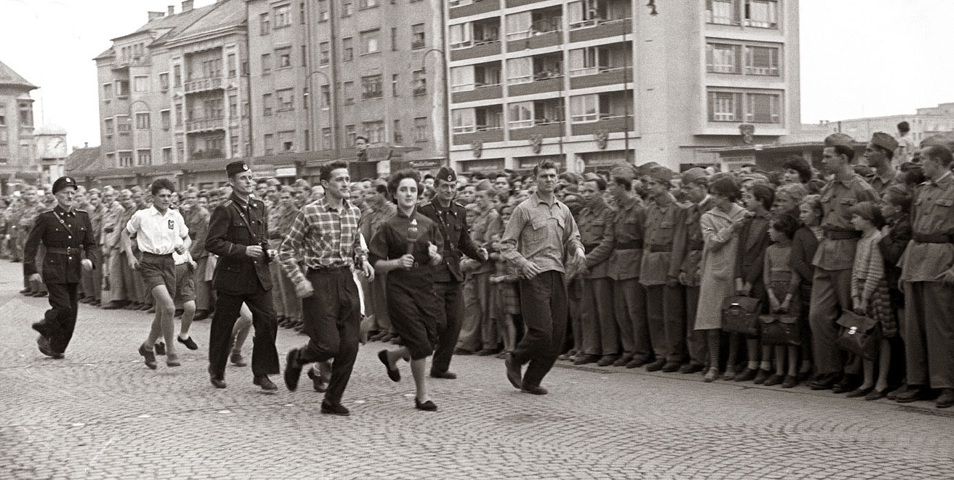 Prihod Titovih štafet v Mariboru.